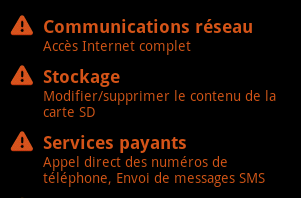 photo qui représente les droits d'installation d'une application sur Android